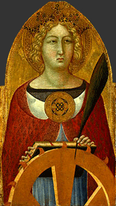 connu aussi avec le nom de Maître d'Ovile, actif à Sienne entre 1340-1360, (Washington, National Gallery). La sainte est représentée ici avec les attributs de son martyre.